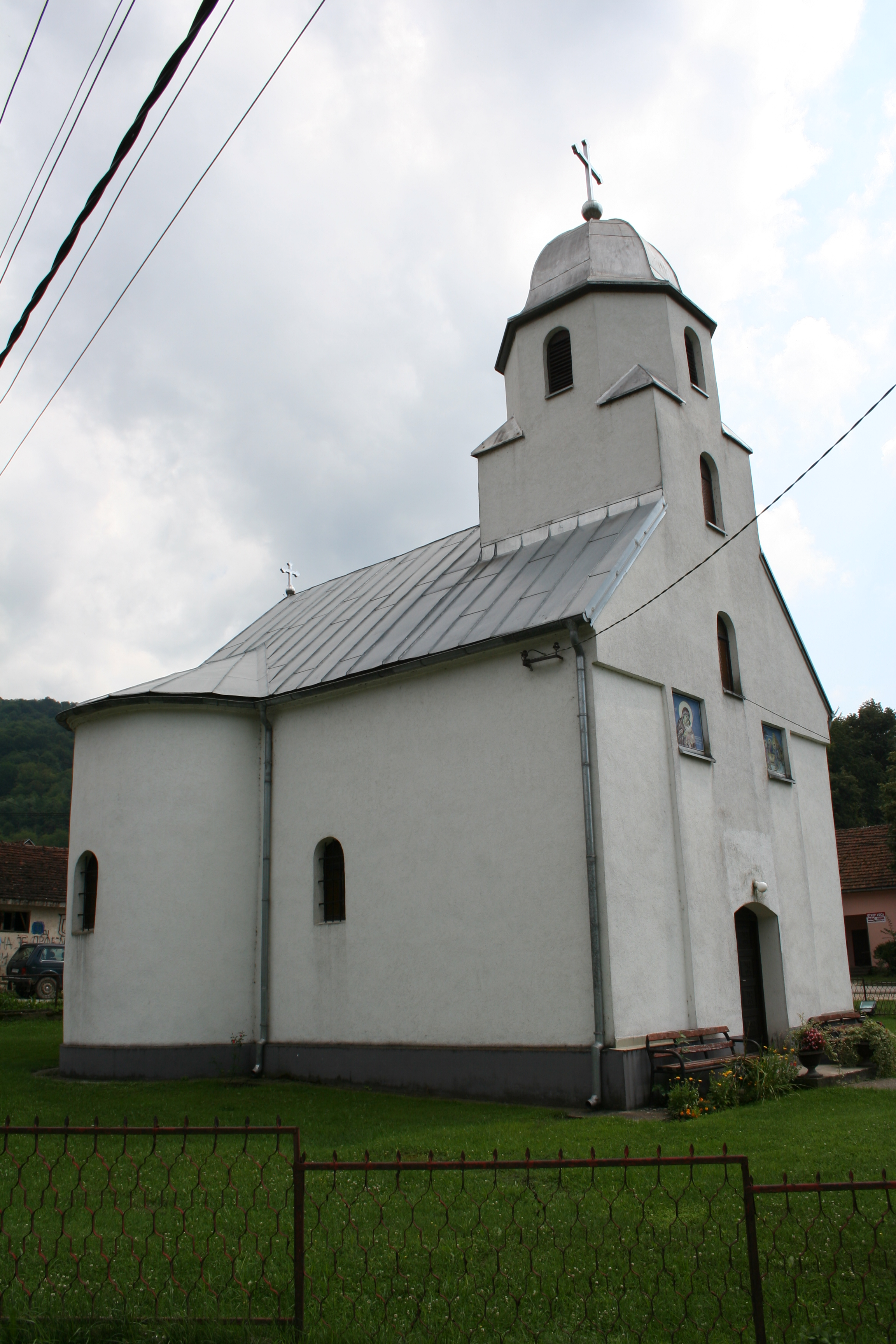 Crkva Sv. Trojice, Donja Trešnjica